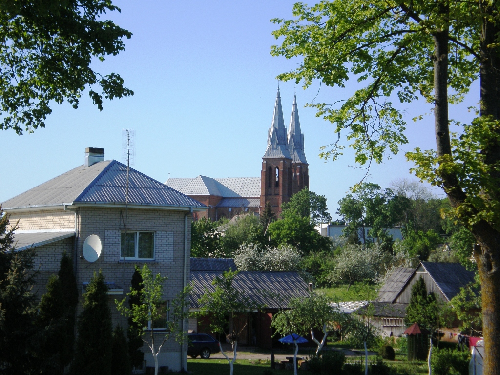 Josvainiai, Kėdainių raj.